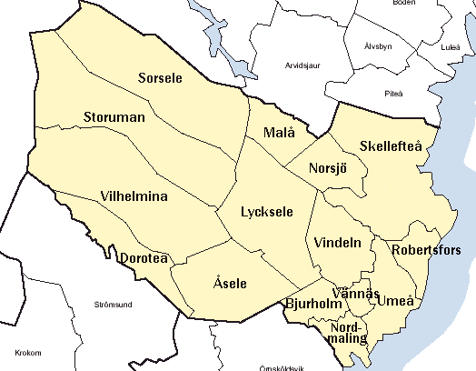 Västerbotten County (län) in Sweden